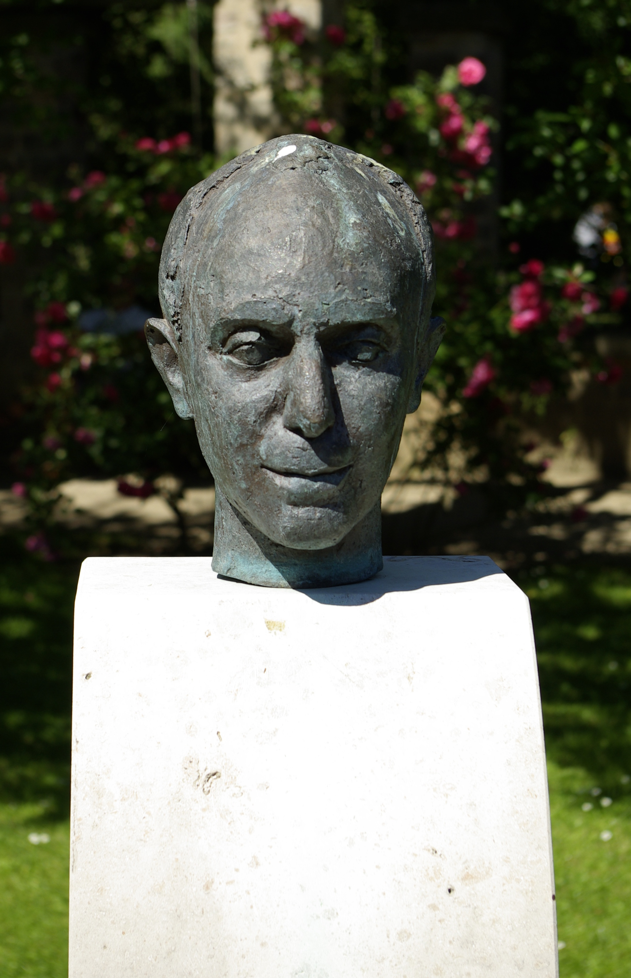 Die von Eva Hermann und Heinz Siebenkäß gestaltete und 2007 enthüllte Hans-Schiller-Büste im Stadtpark in Fürth.